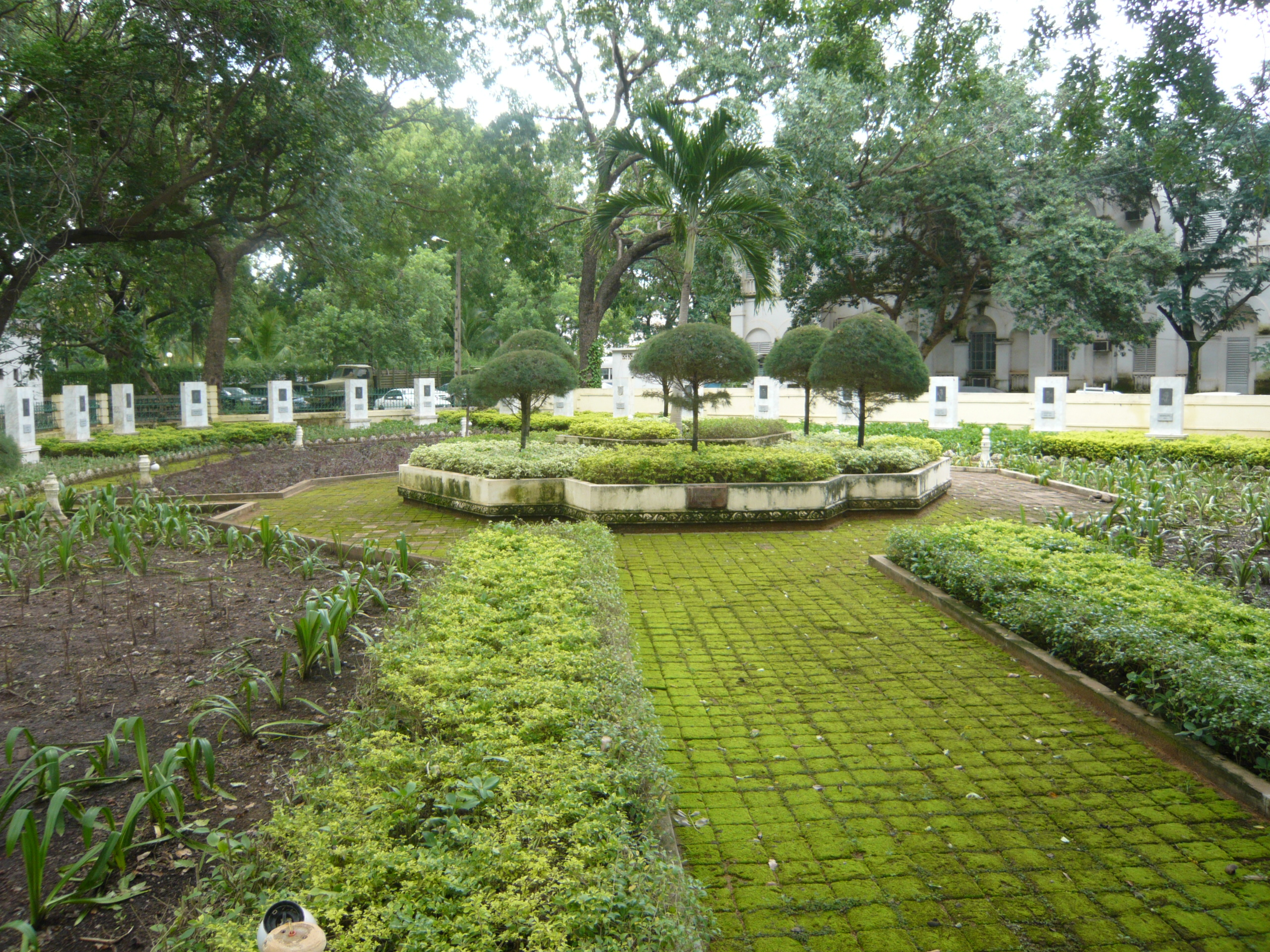 Place des gouverneurs, Koulouba - Bamako, Mali